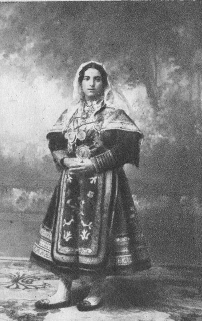 Tipo de Serrana - La Alberca (Salamanca) - España Turística y Monumental / Cuarto álbum / Las Bellezas de Castilla / Región Leonesa - Cromo 50 x 70 Sepia